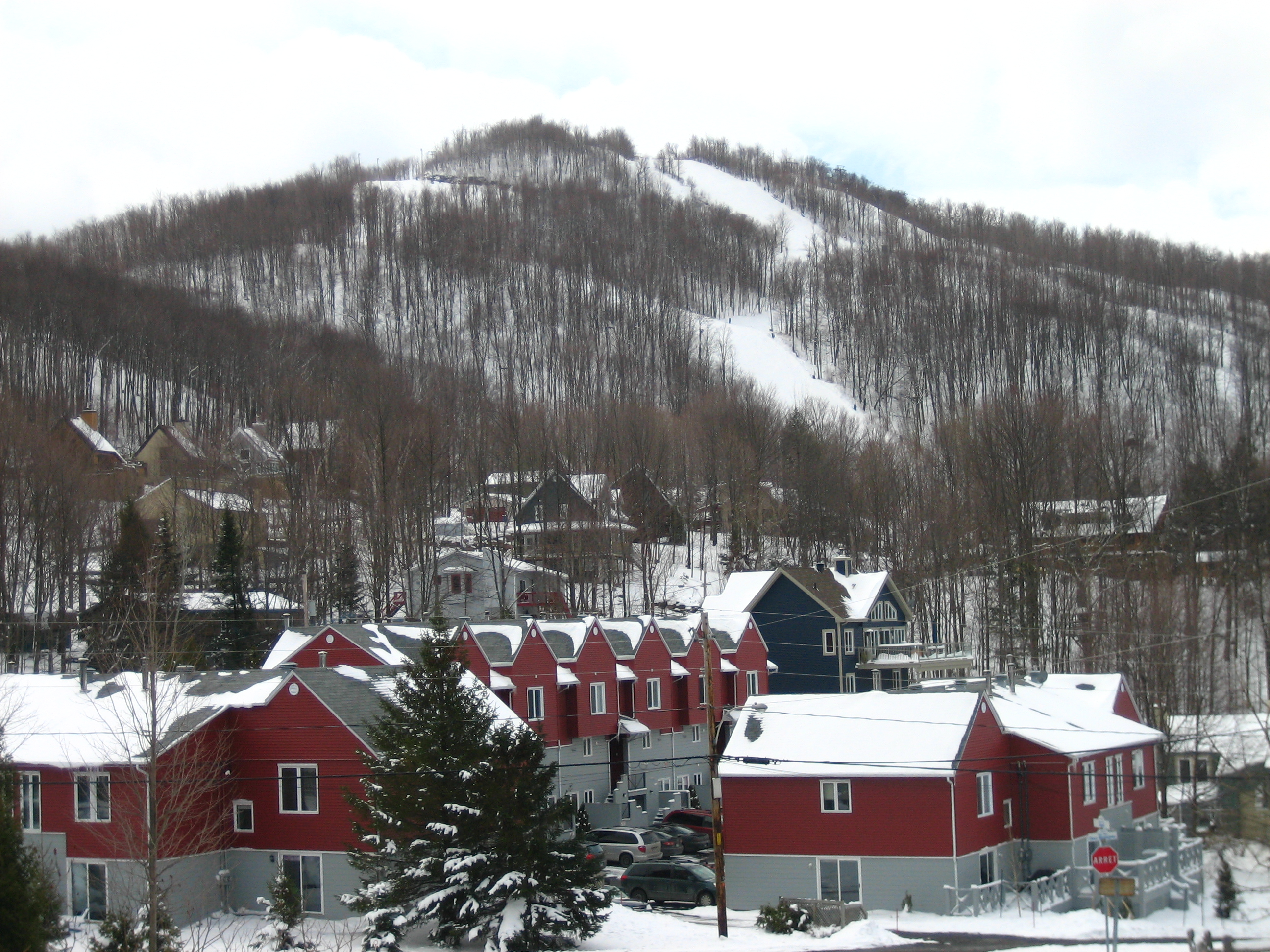 Bromont (vue de la maison)